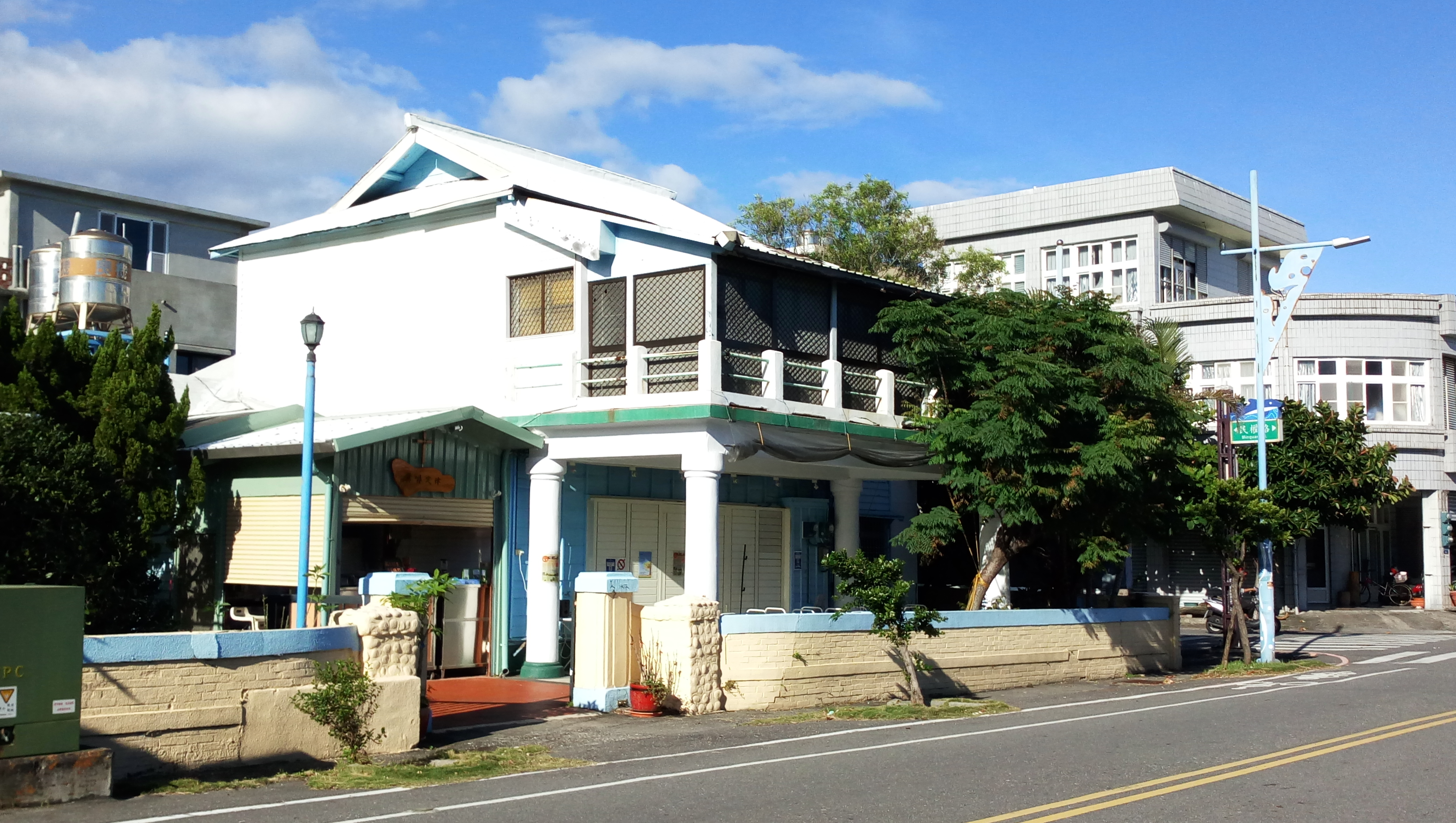 中文（台灣）: 新港教會會館，是臺東縣文化資產，隸屬台灣基督長老教會新港教會，位於臺東縣成功鎮中山東路55號。